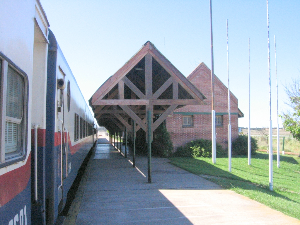 canon powershot a510